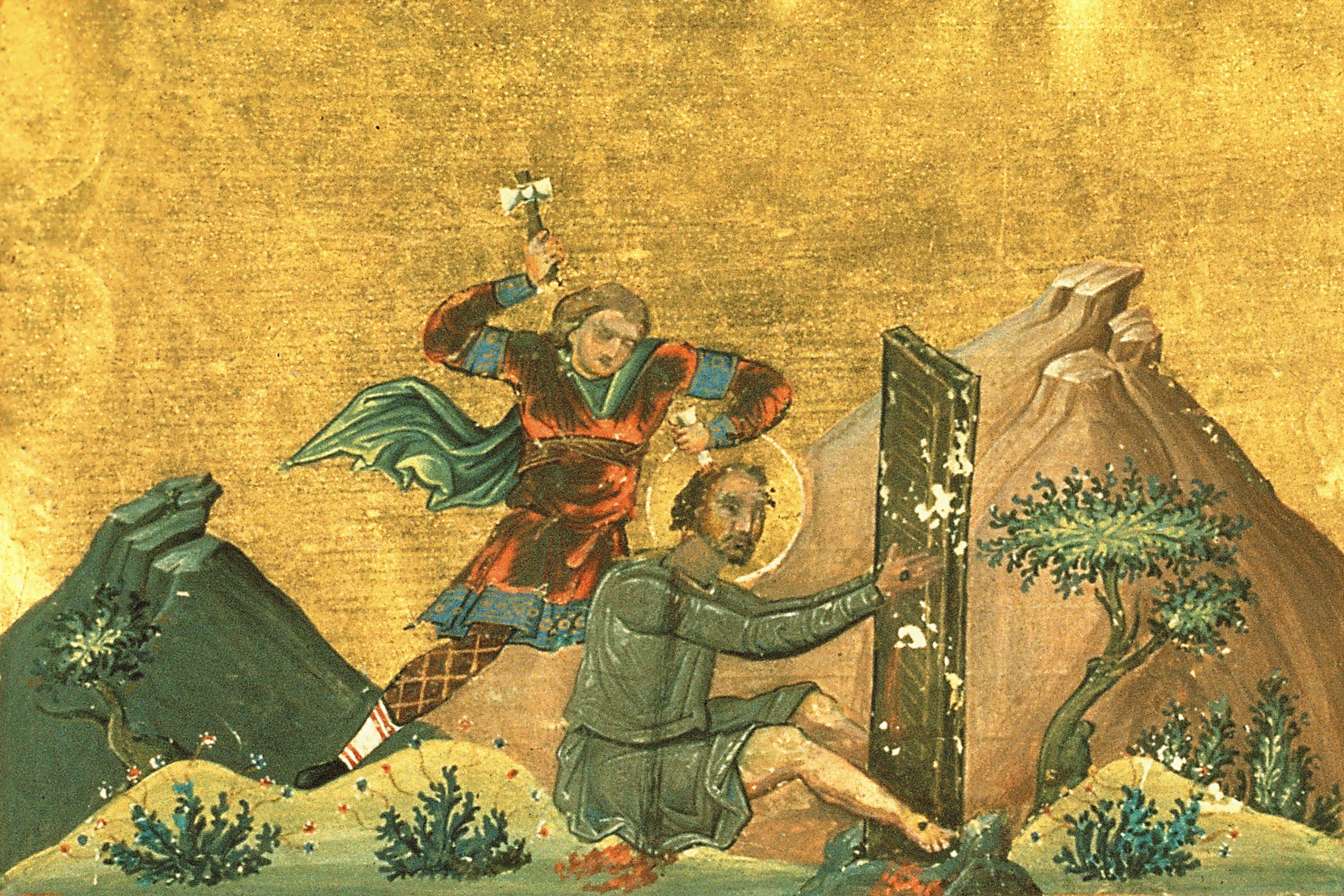 Мученик Иулиан Эмесский